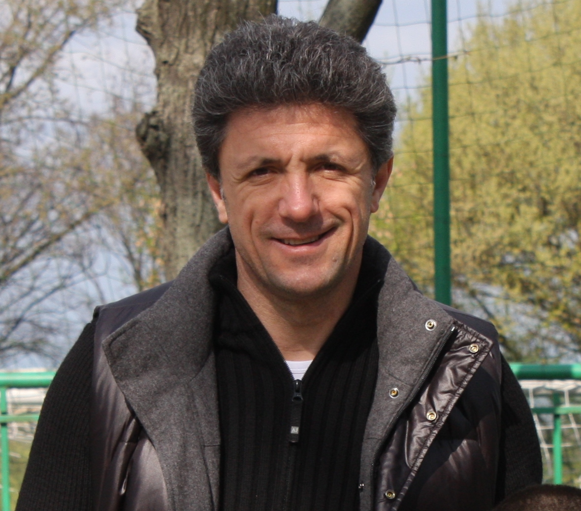 Gică Popescu este un fost fotbalist roman, in prezent impresar.